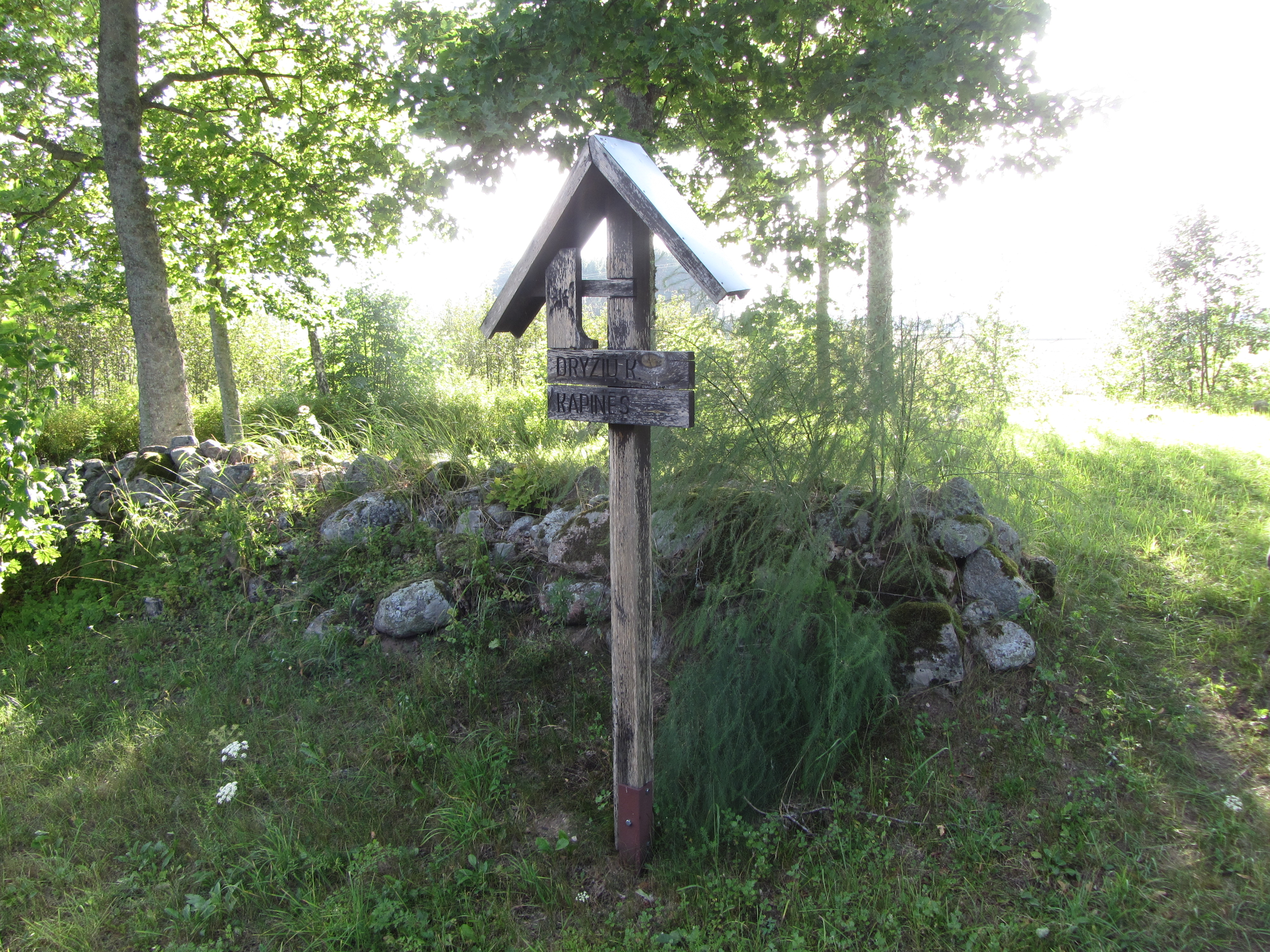 Saldutiškio sen., Lithuania